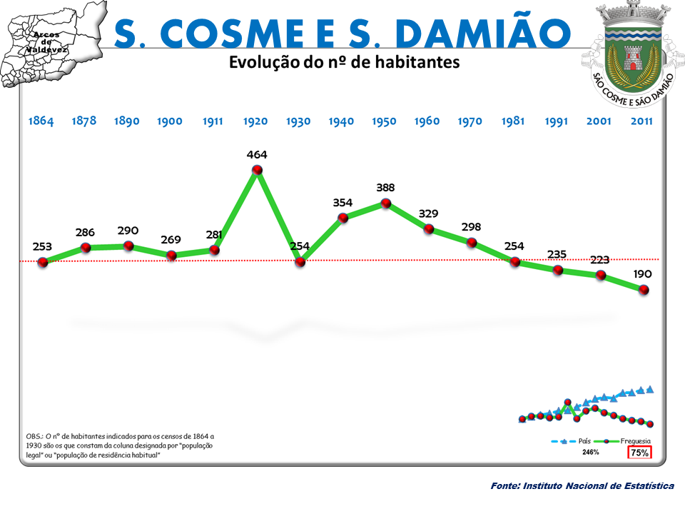 Censos 1864/2011